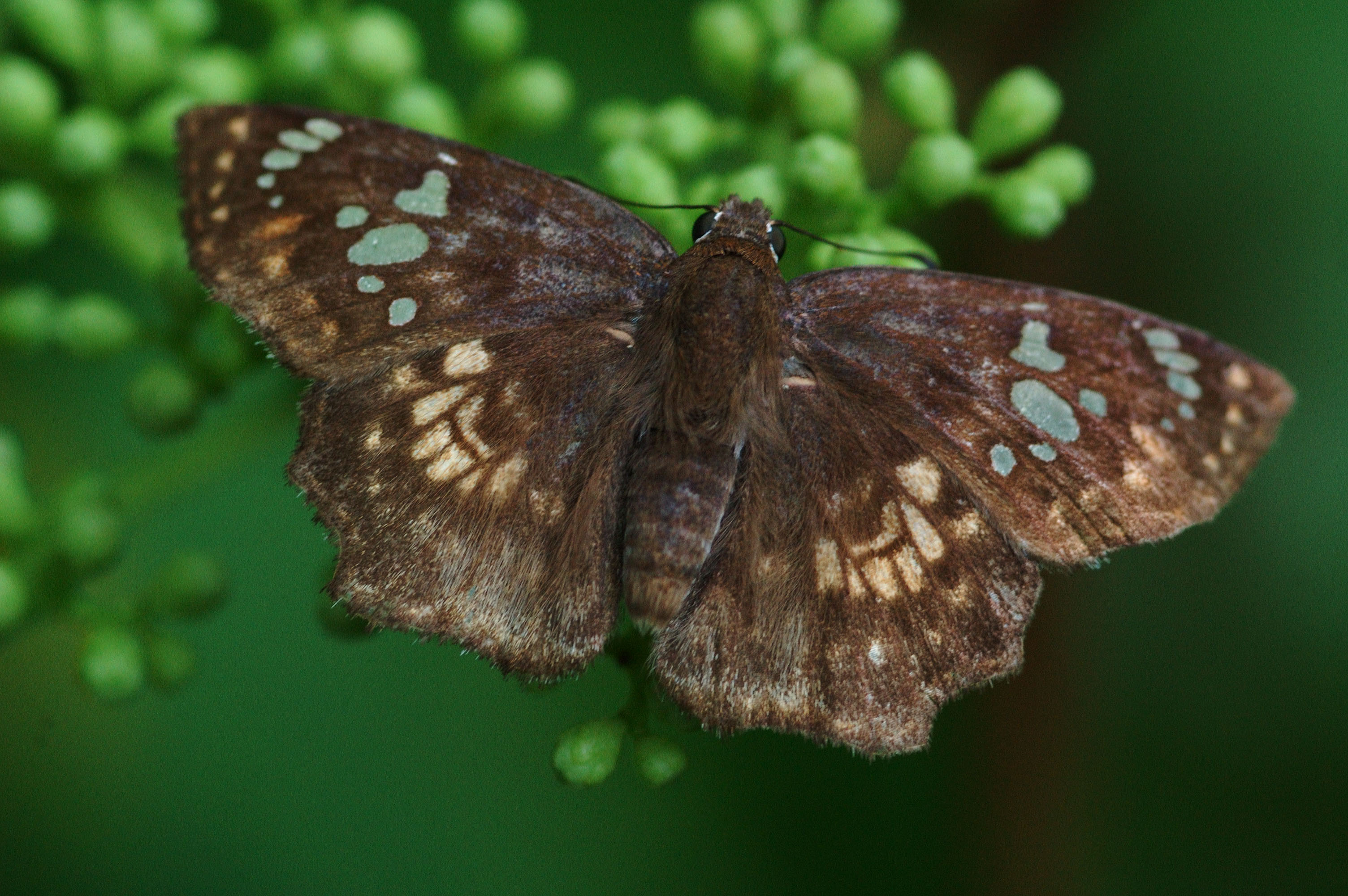 Golden Angle : Odonoptilum ransonnetti C & R Felder or Caprona ransonnetti